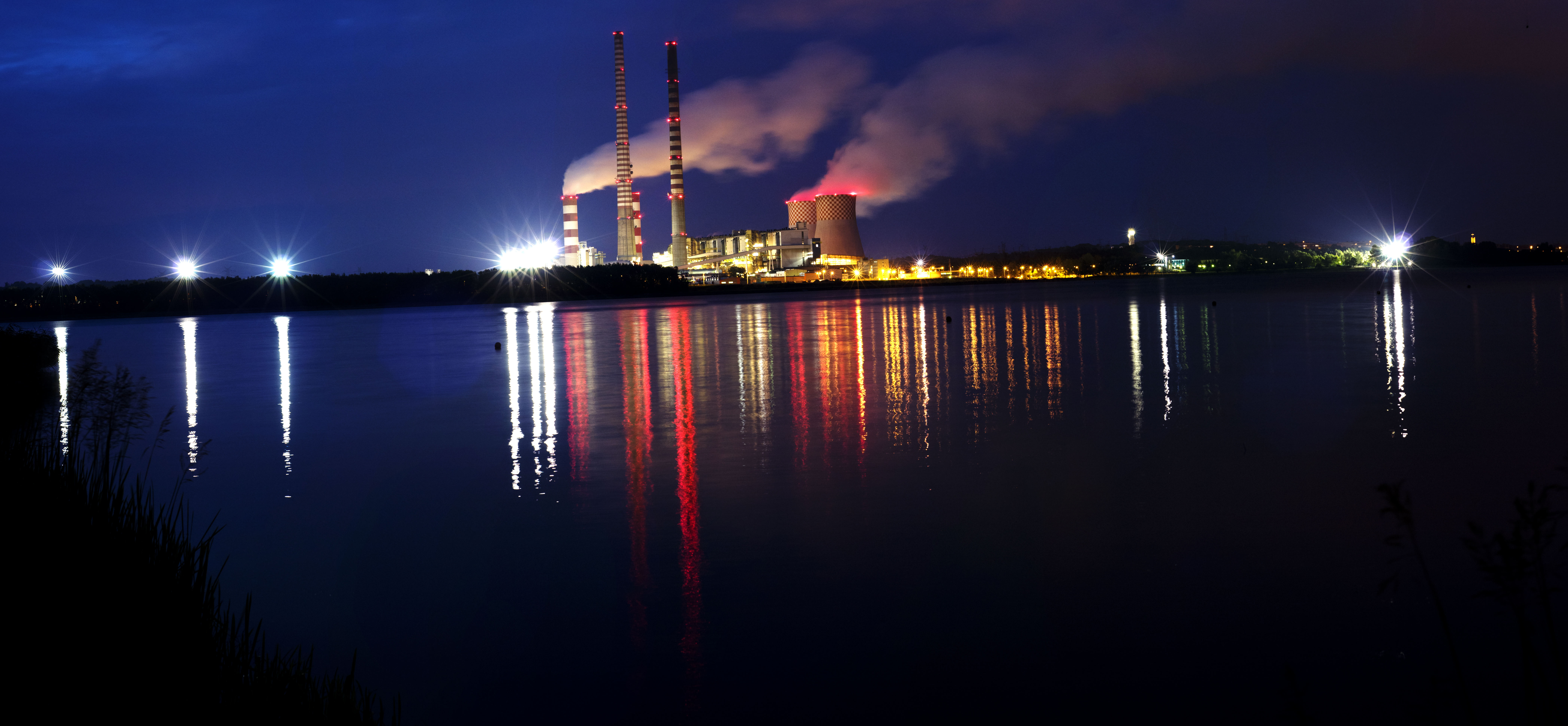 Widok na Elektrownię Rybnik nocą, na zdjęciu widać wielkość kompleksu na tle Zalewu Rybnickiego